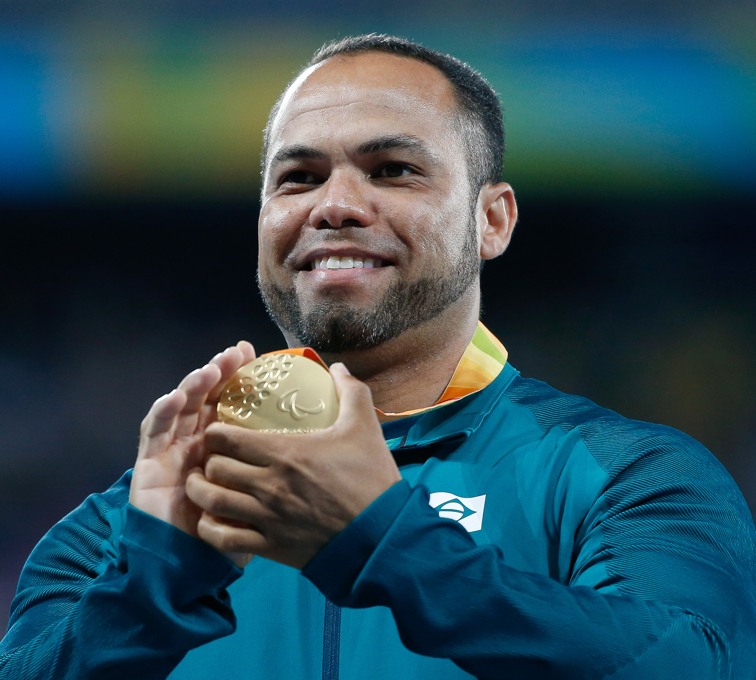 Rio de Janeiro - Brasileiro Claudiney Batista dos Santos recebe medalha de ouro no lançamento de disco F56 do atletismo nos Jogos Paralímpicos Rio 2016, no Estádio Olímpico.